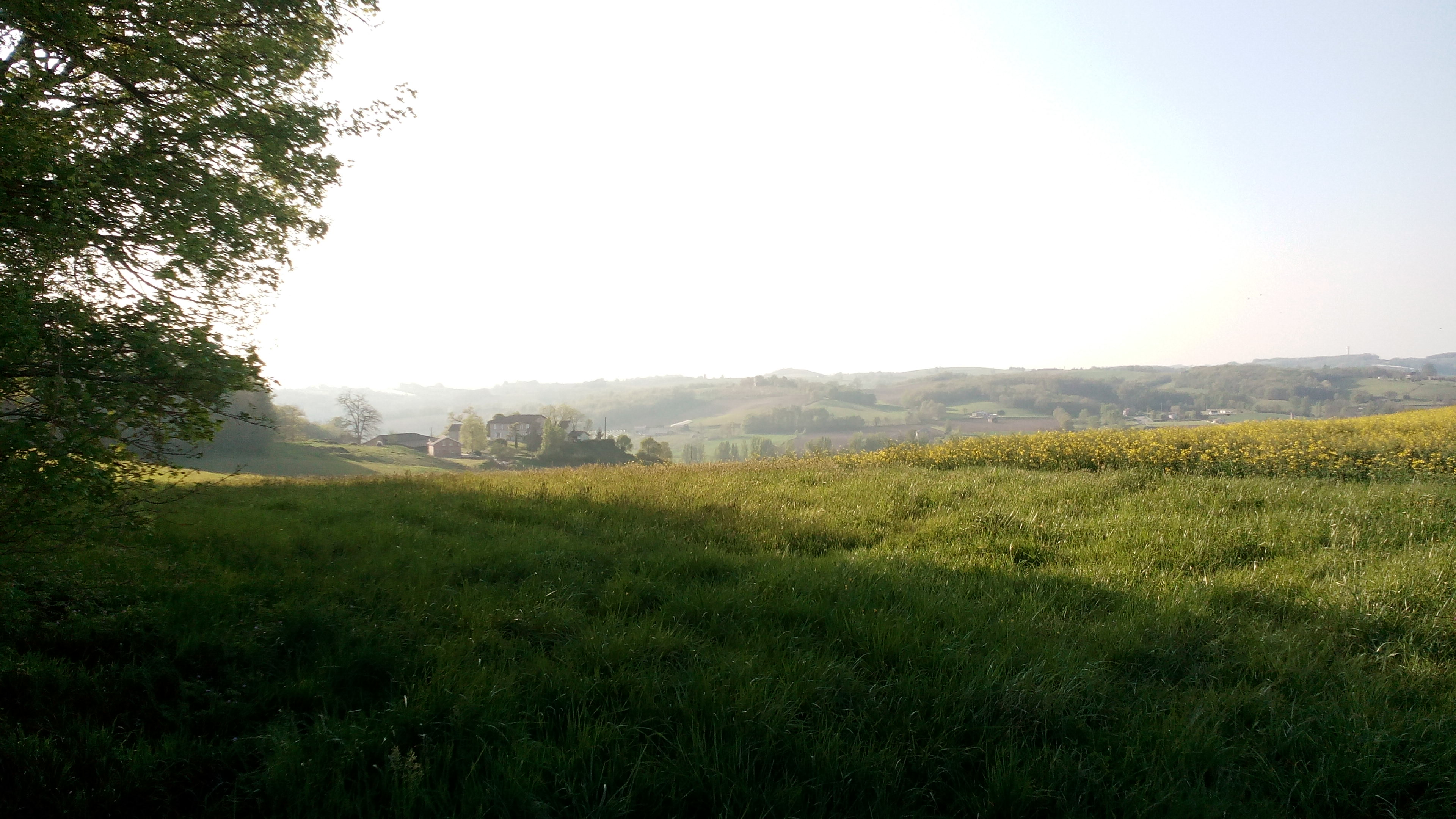 Le vallon de la Lupte, vue des coteaux.